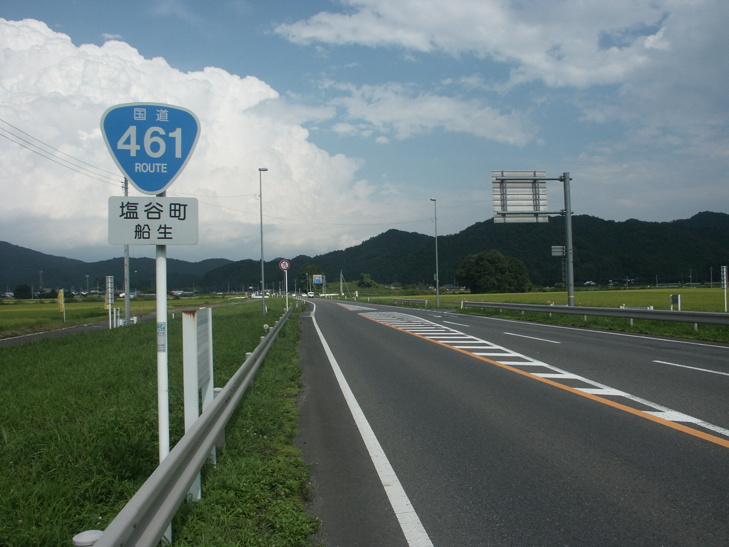 国道461号線船生バイパス栃木県塩谷町船生（矢板方面を撮影）